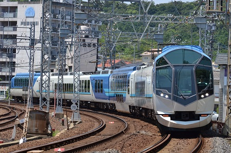 近鉄特急「しまかぜ」近鉄鳥羽線池の浦～鳥羽